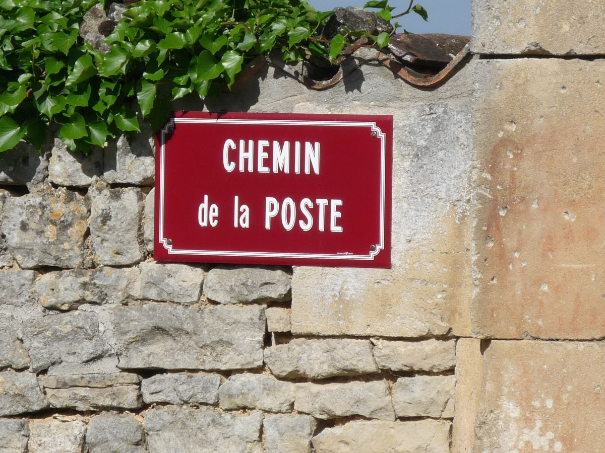 Ancien chemin de la poste, Villars, Mérignac, Charente, France